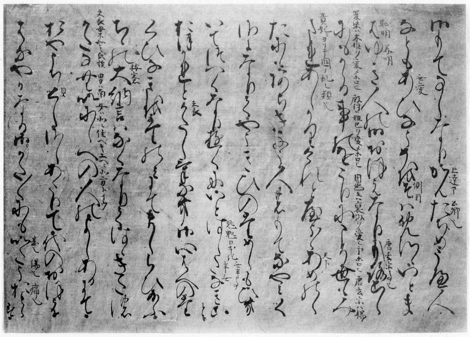 金子本桐壷巻の写真。『定本源氏物語新解』上巻（1930年刊）より。